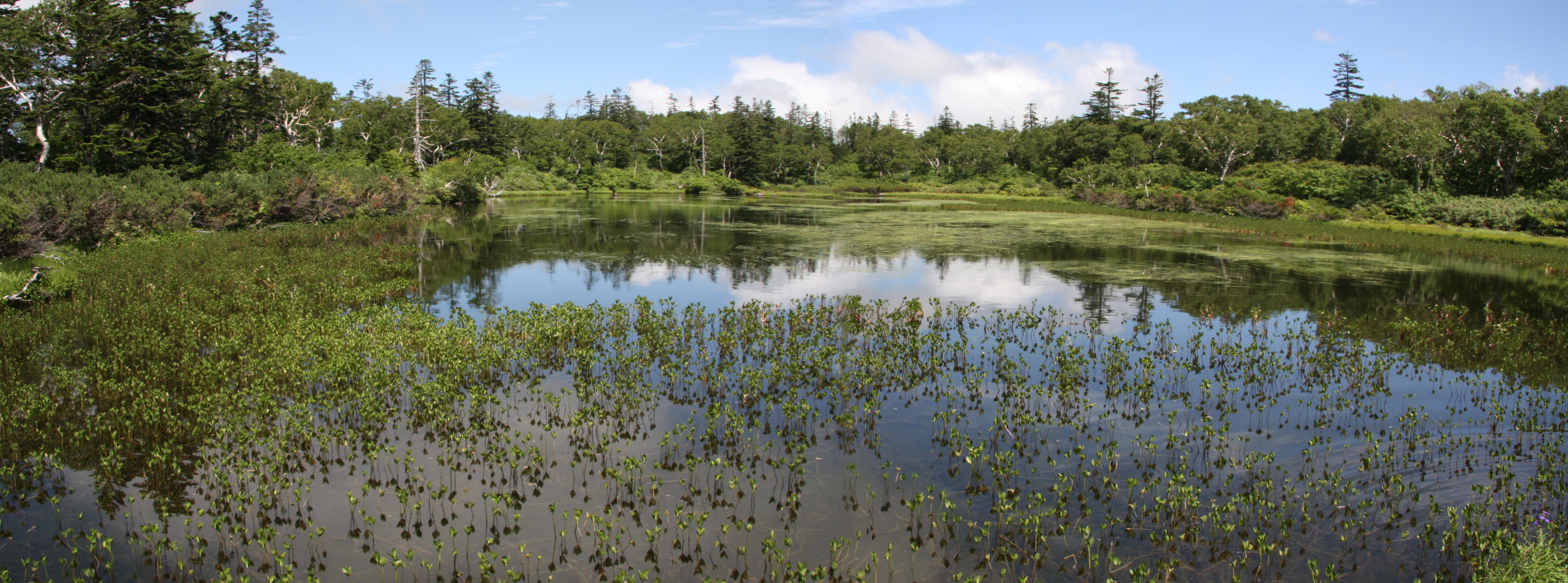 ニセコ山系 神仙沼